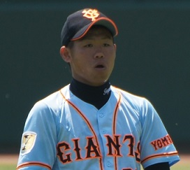 ジャイアンツ田口選手